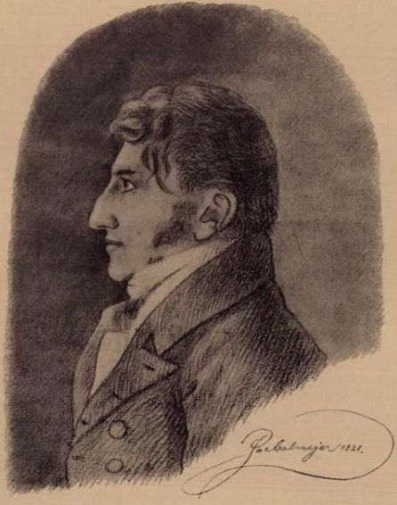 Sølvverksdirektør Poul Steenstrup (1772–1864)